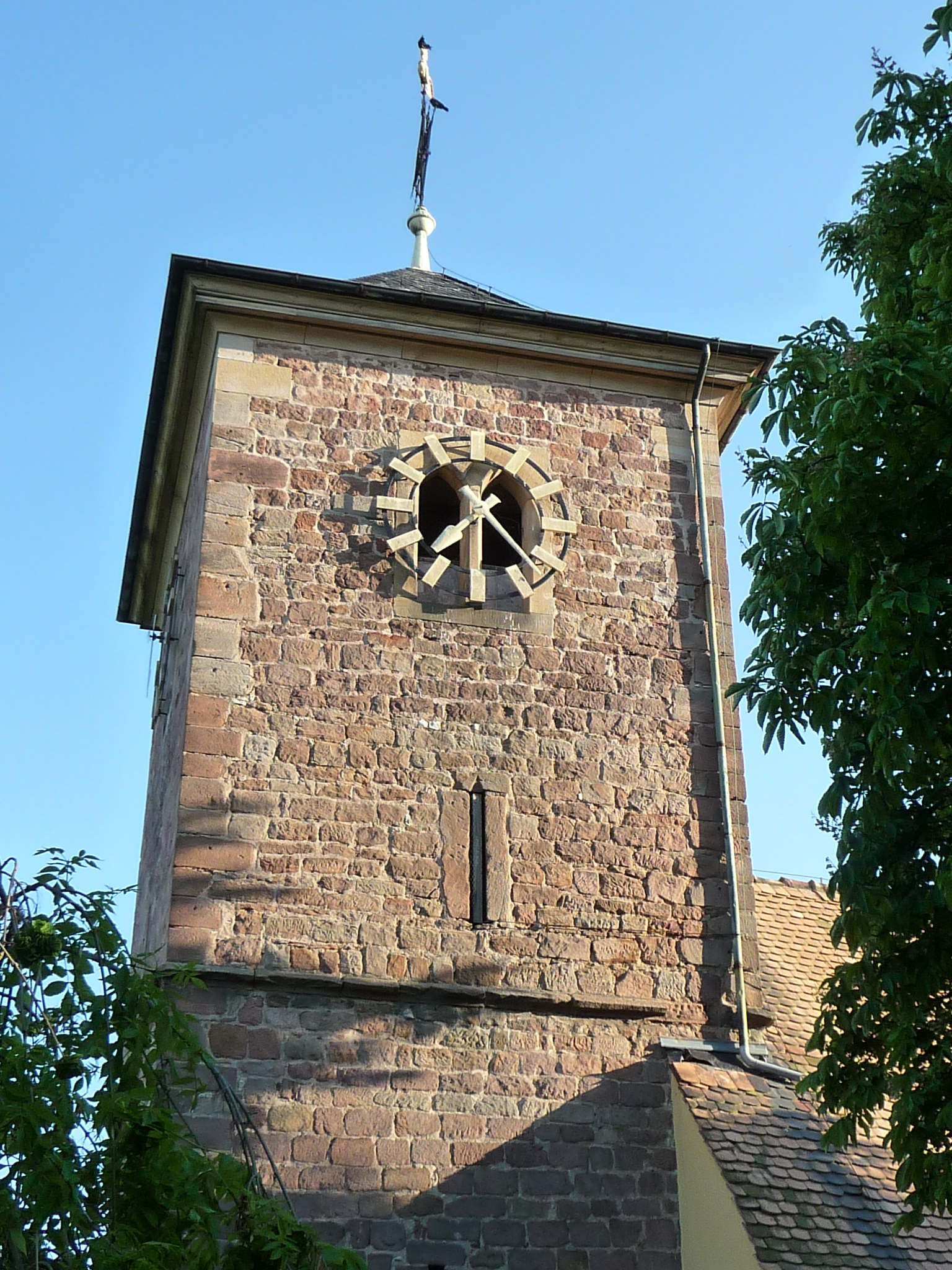 Herxheim am Berg ist eine Ortsgemeinde im Landkreis Bad Dürkheim in Rheinland-Pfalz. Sie gehört der Verbandsgemeinde Freinsheim an.